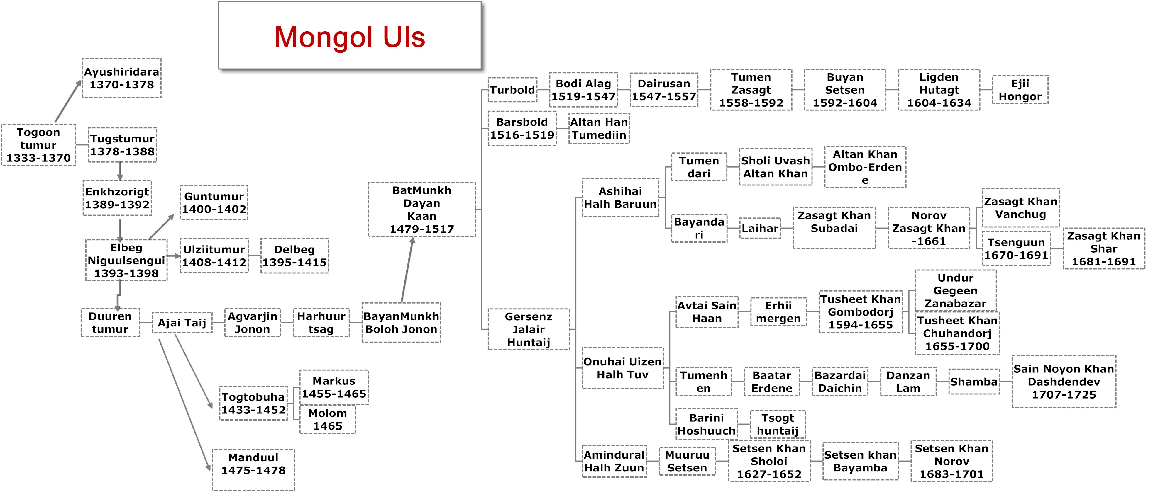 Монгол: Монгол Улсын хаад